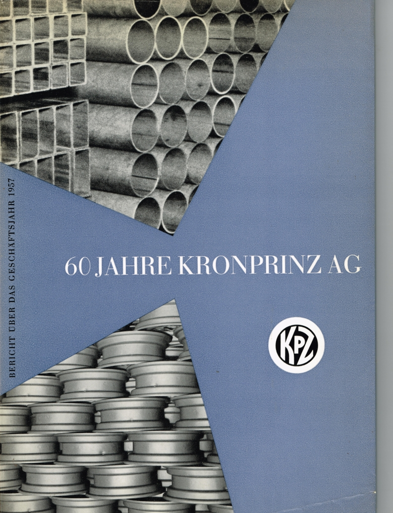 Geschäftsbericht 60 Jahre Kronprinz AG